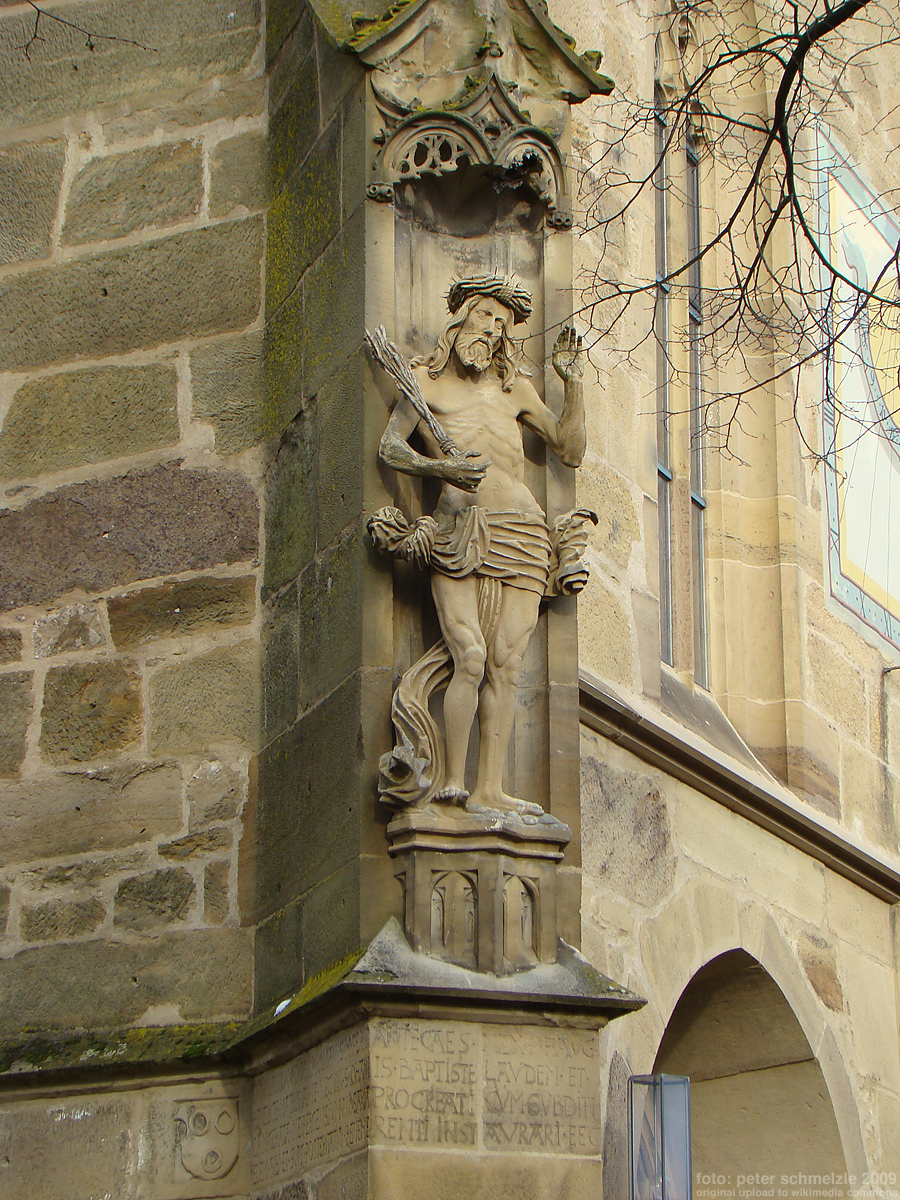 Schmerzensmann an der Stadtkirche Schwaigern